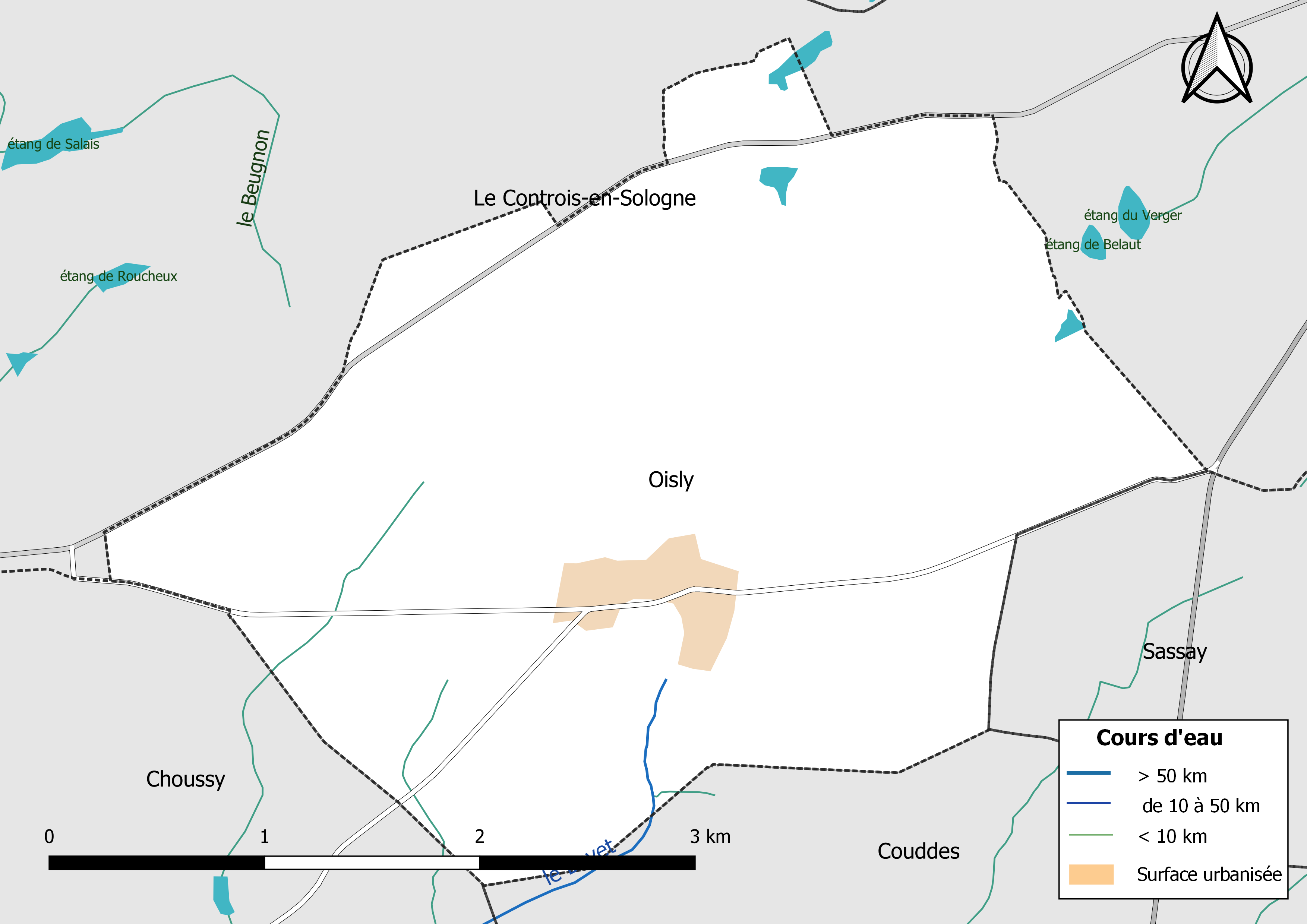 Carte du réseau hydrographique de la commune de Oisly (Loir-et-Cher, France).